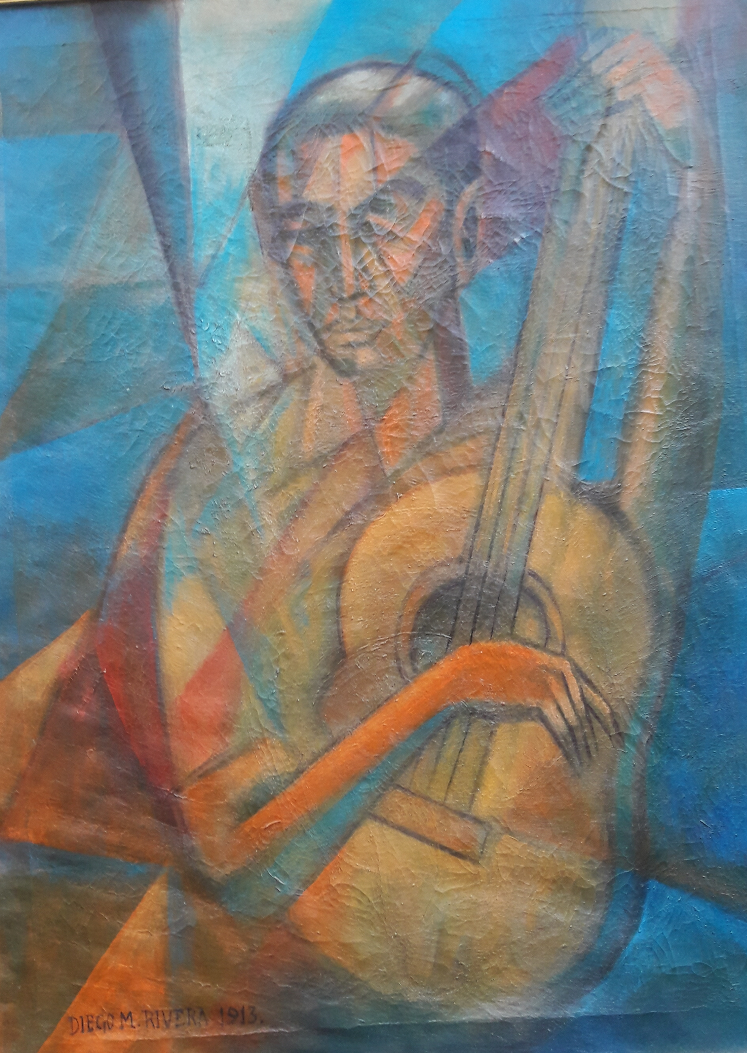 CUBOFUTURISMO PRIMER OBRA CUBISTA DEL MAESTRO DIEGO RIVERA EN EUROPA 1913. COLECCION PRIVADA.